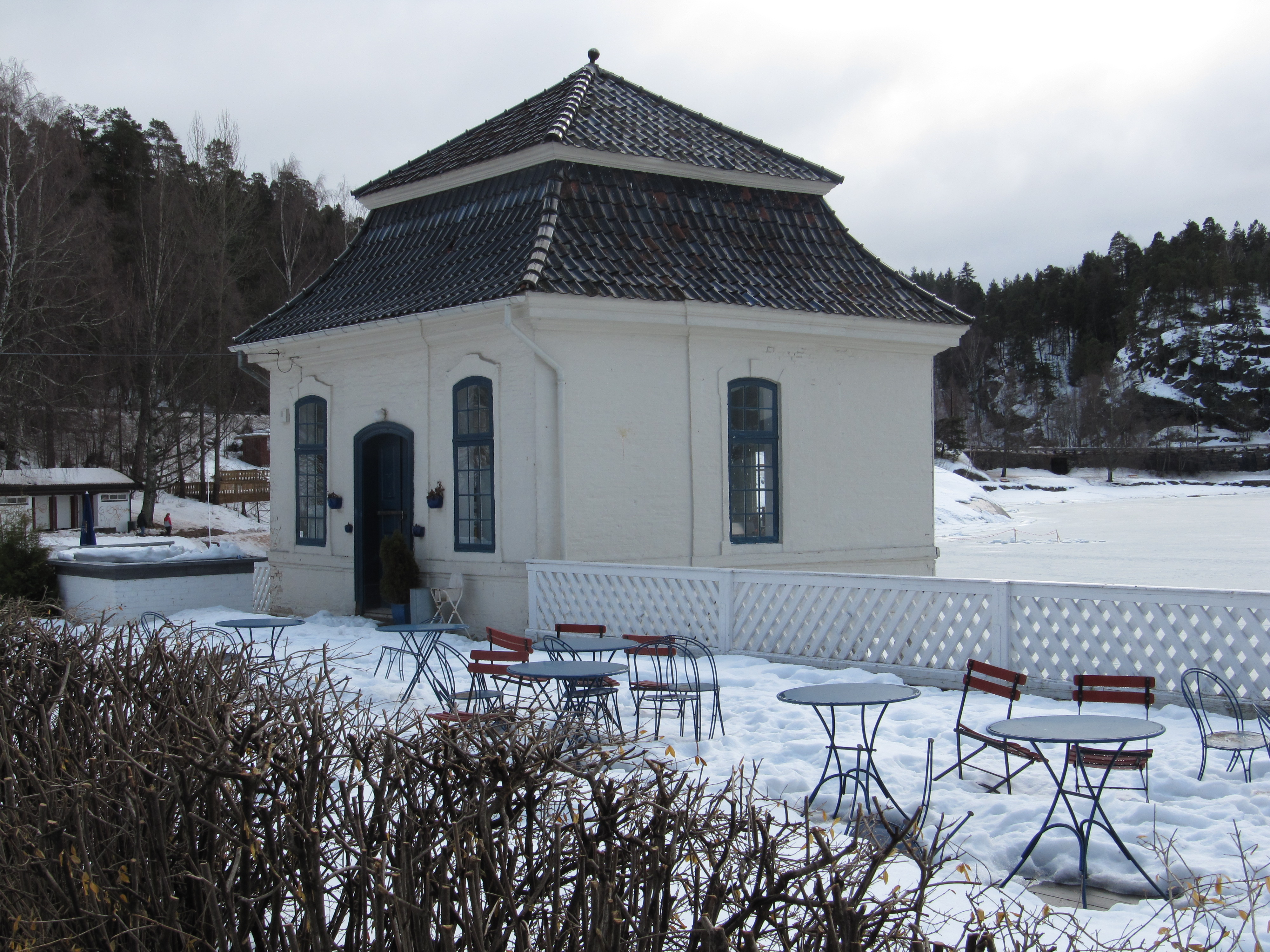 Lysthuset/paviljongen i Hvervenbukta, brukes som kiosk/kafe.